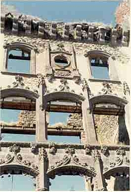 Façade en ruine de l'ancien château de Clavière-Ayrens à Ayrens (15)